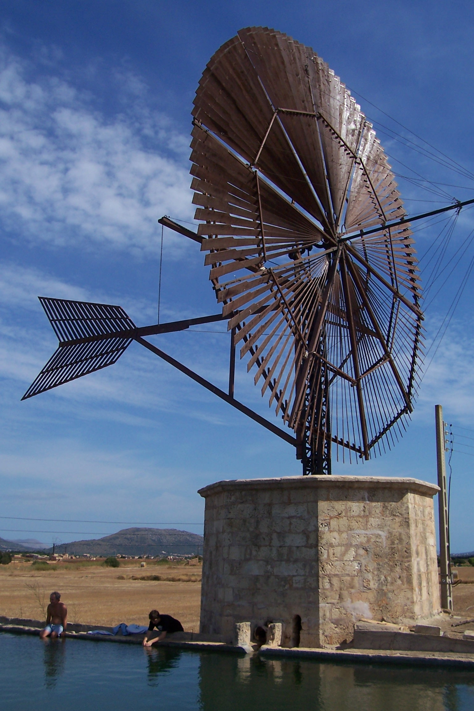 windmill. Molí d'en Tenre. Muro, Mallorca, Balearic Islands.